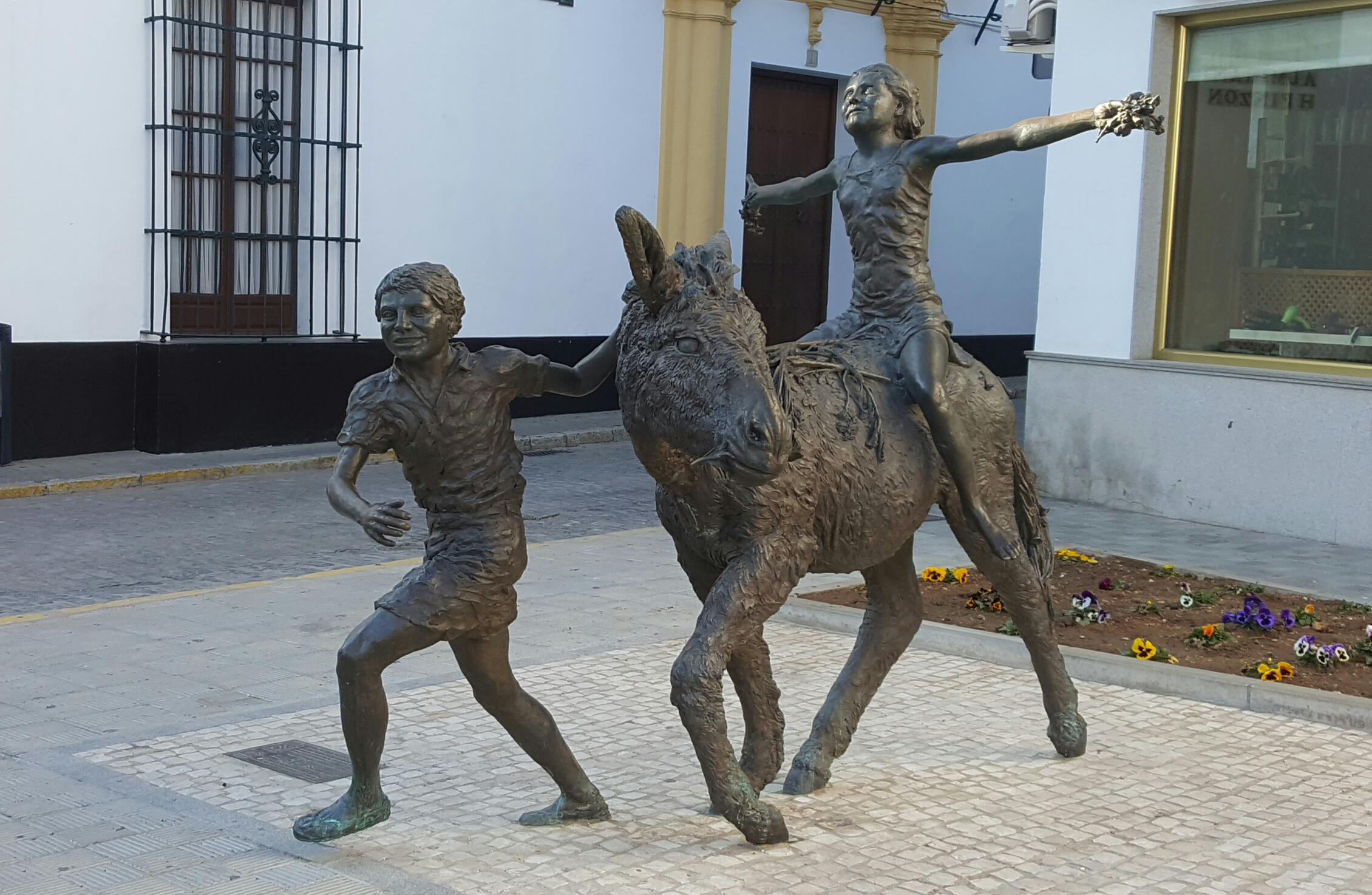 Escultura perteneciente al Museo al aire libre Moguer EScultura de Moguer, Andalucía (España). Escultura incluida en la serie PlateroEScultura con el nombre "Idilio de Abril".